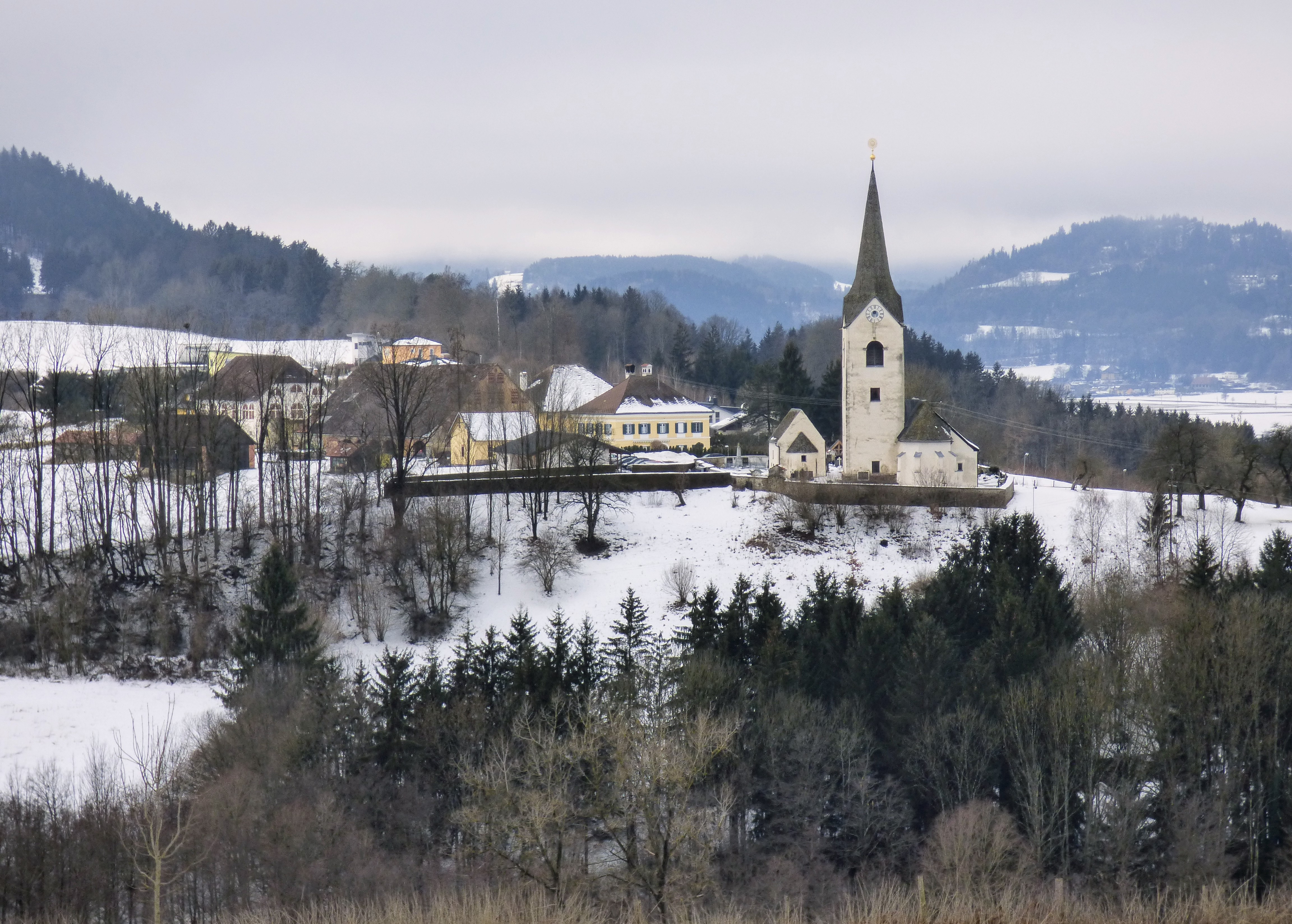 Hörzendorf (Gde. St. Veit an der Glan): Siedlung am Kirchenhügel